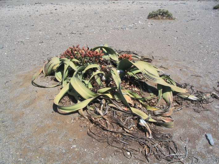 'n Welwitschia afgeneem in die Ugabrivierbekken, Namibië